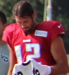 Zach Mettenberger